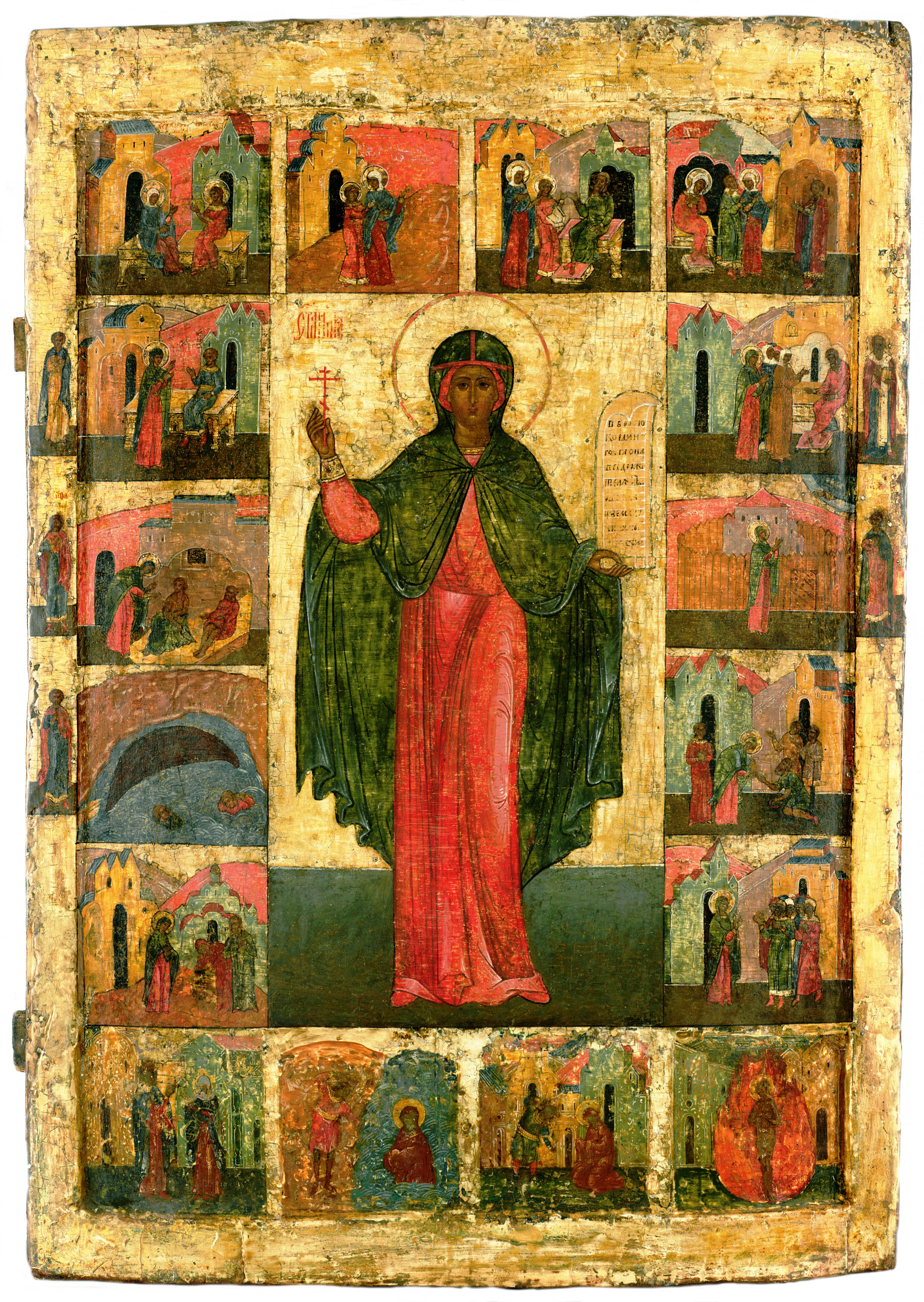 Anastasia